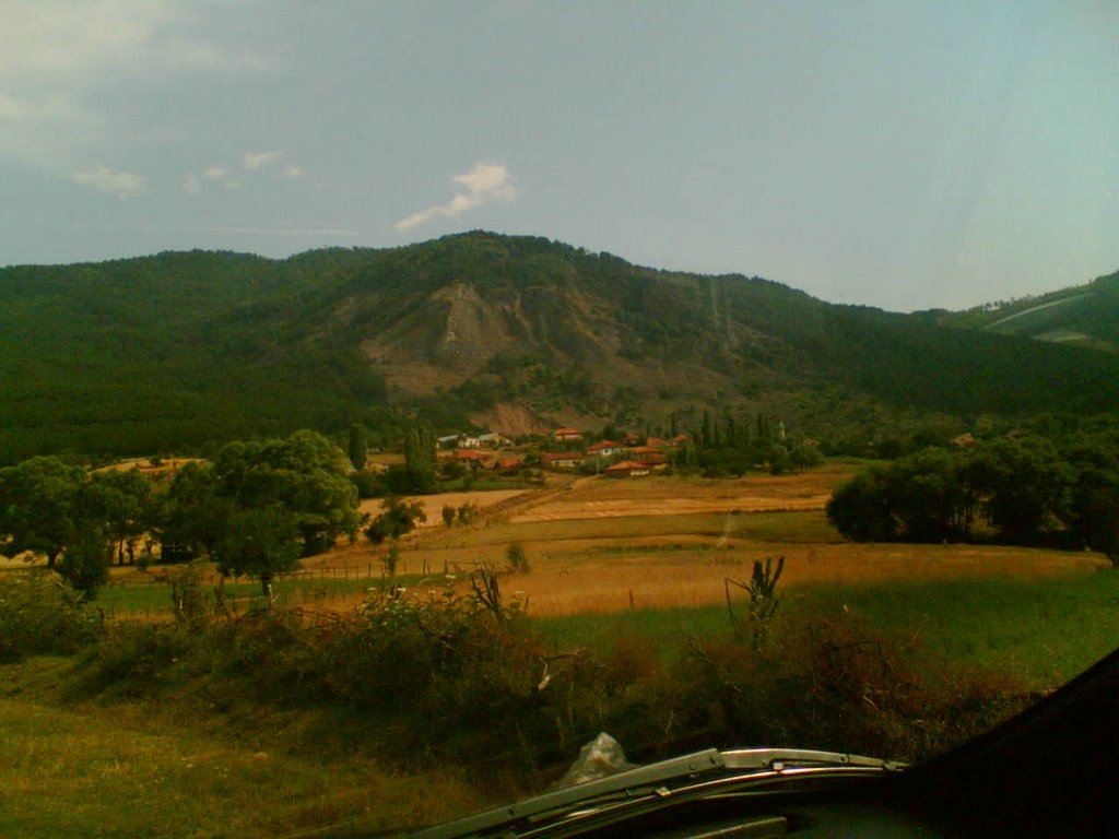 yüylük köyü